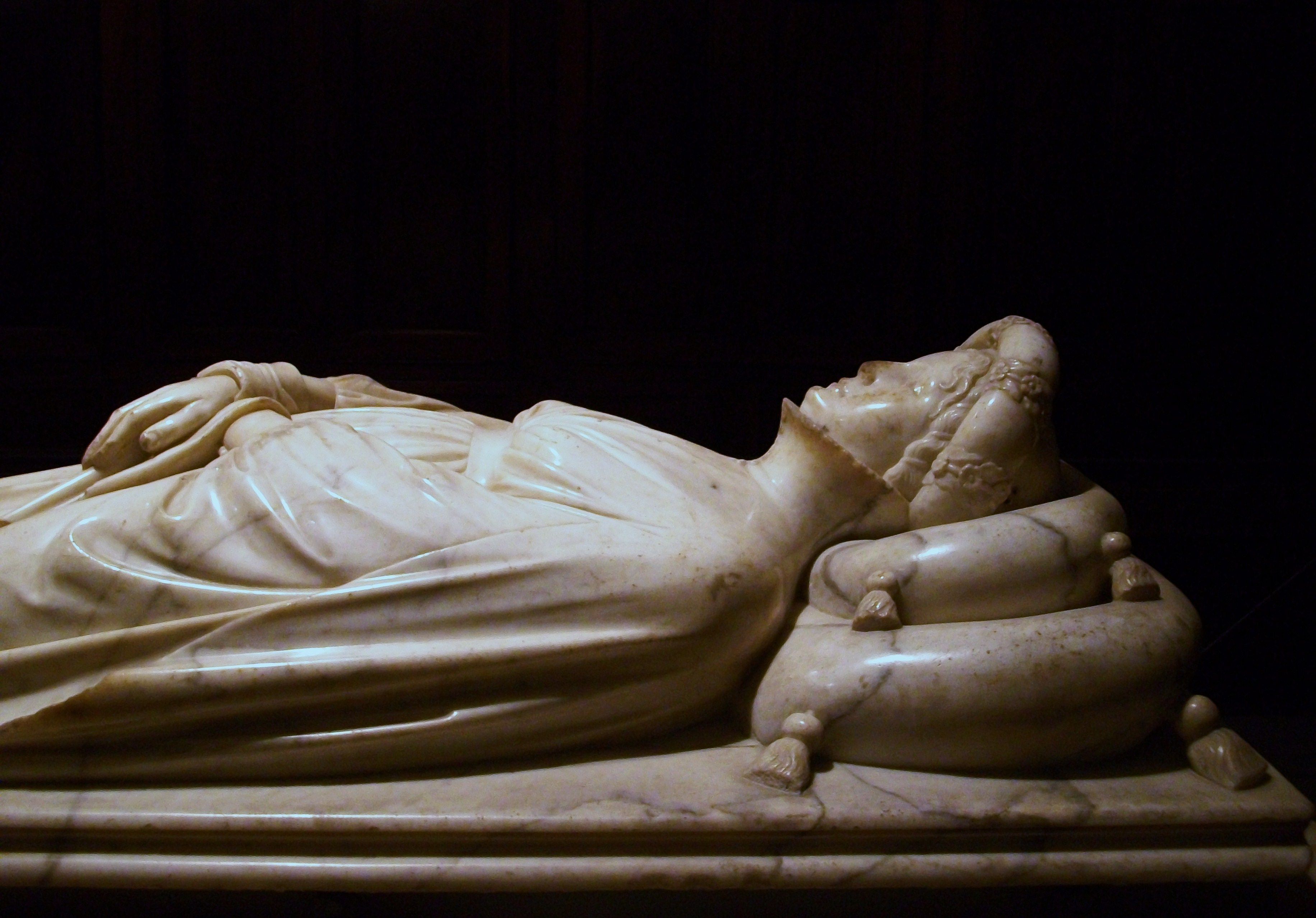 Monument funebre a Ilaria del Carretto, catedral de Lucca.